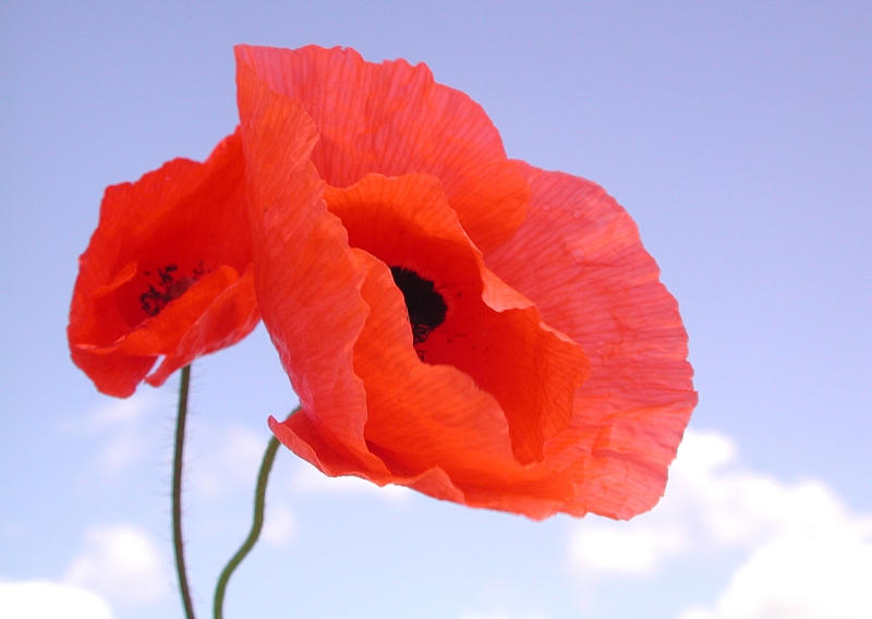 Klatschmohn, Papaver rhoeas, Altlussheim, Deutschland